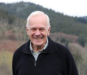 Foto di Brian Anderson